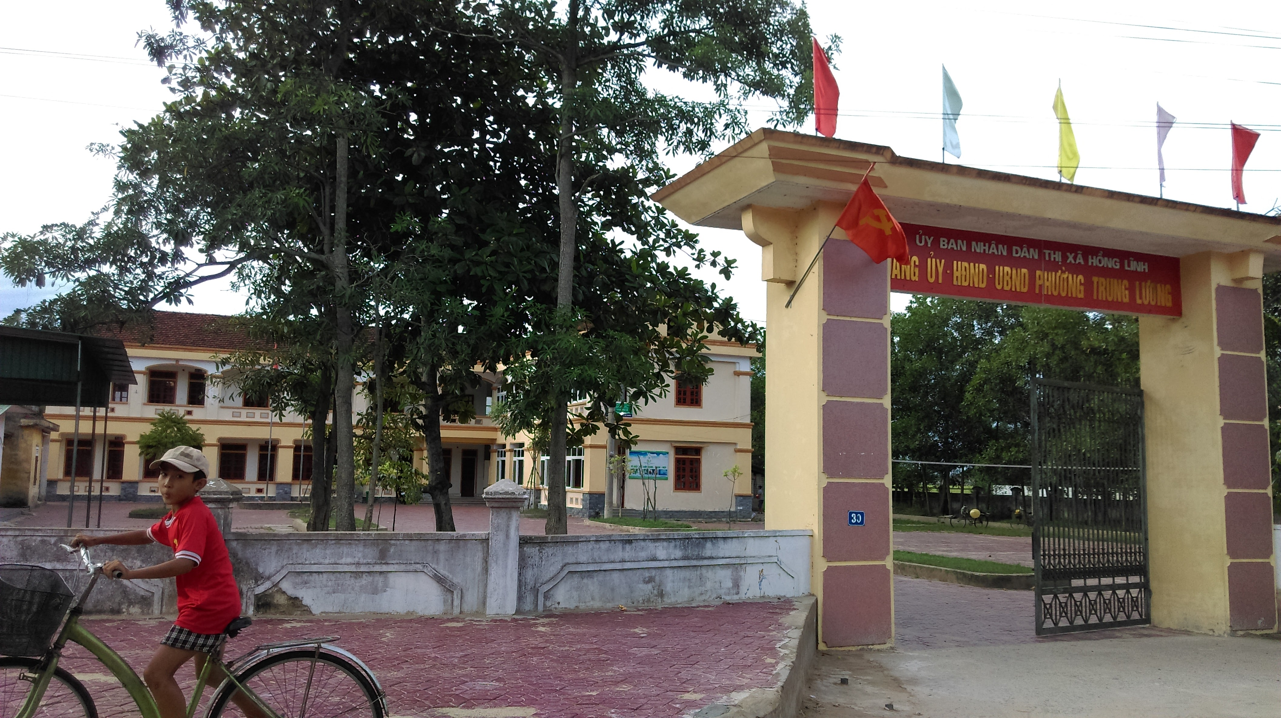 UBND phường Trung Lương, Hồng Lĩnh, Hà Tĩnh